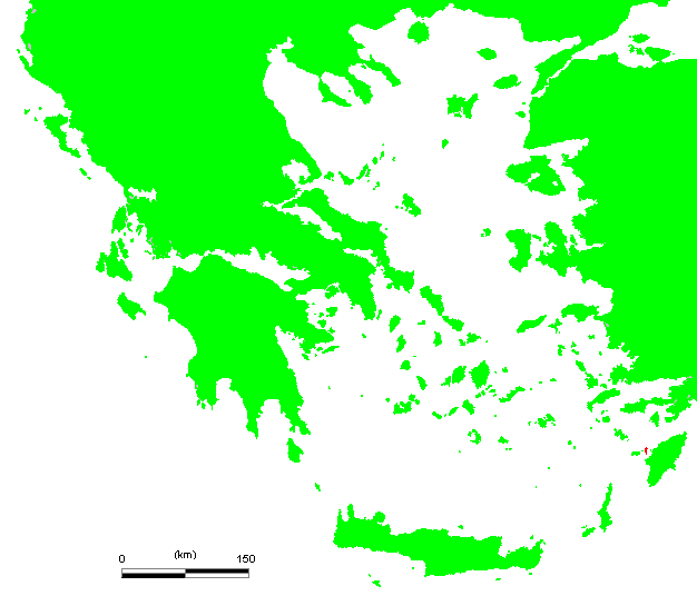 GR Alimia.PNG (Greek island)